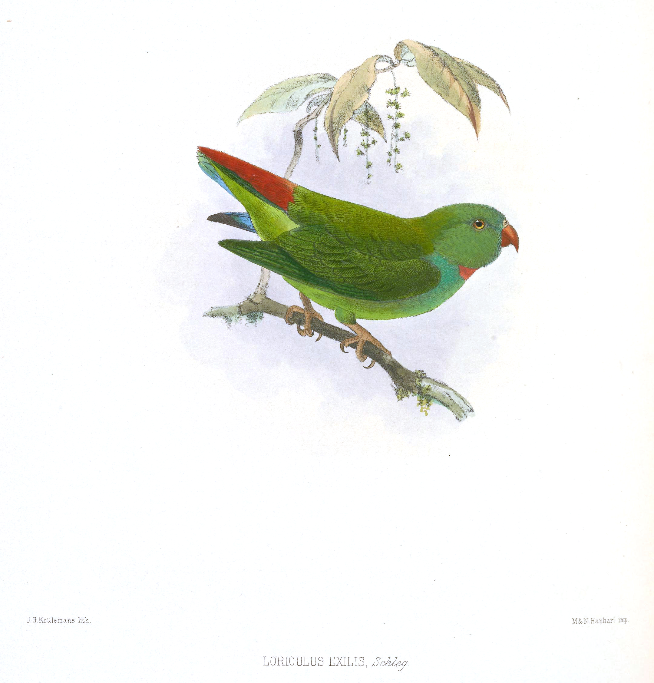 Loriculus exilis